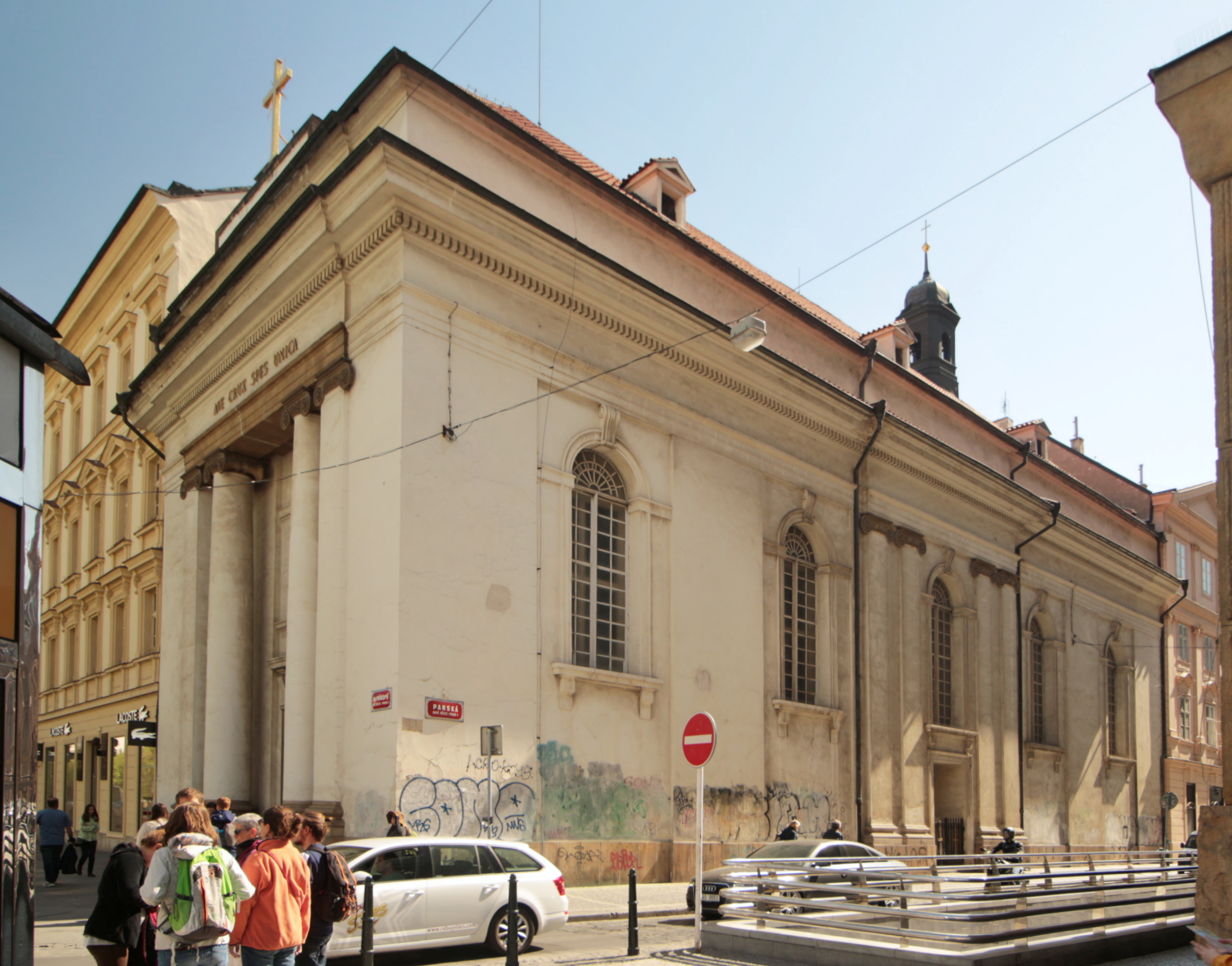 Kostel Svatého Kříže v Praze Na příkopech